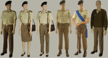 Uniformi di servizio estive esercito italiano